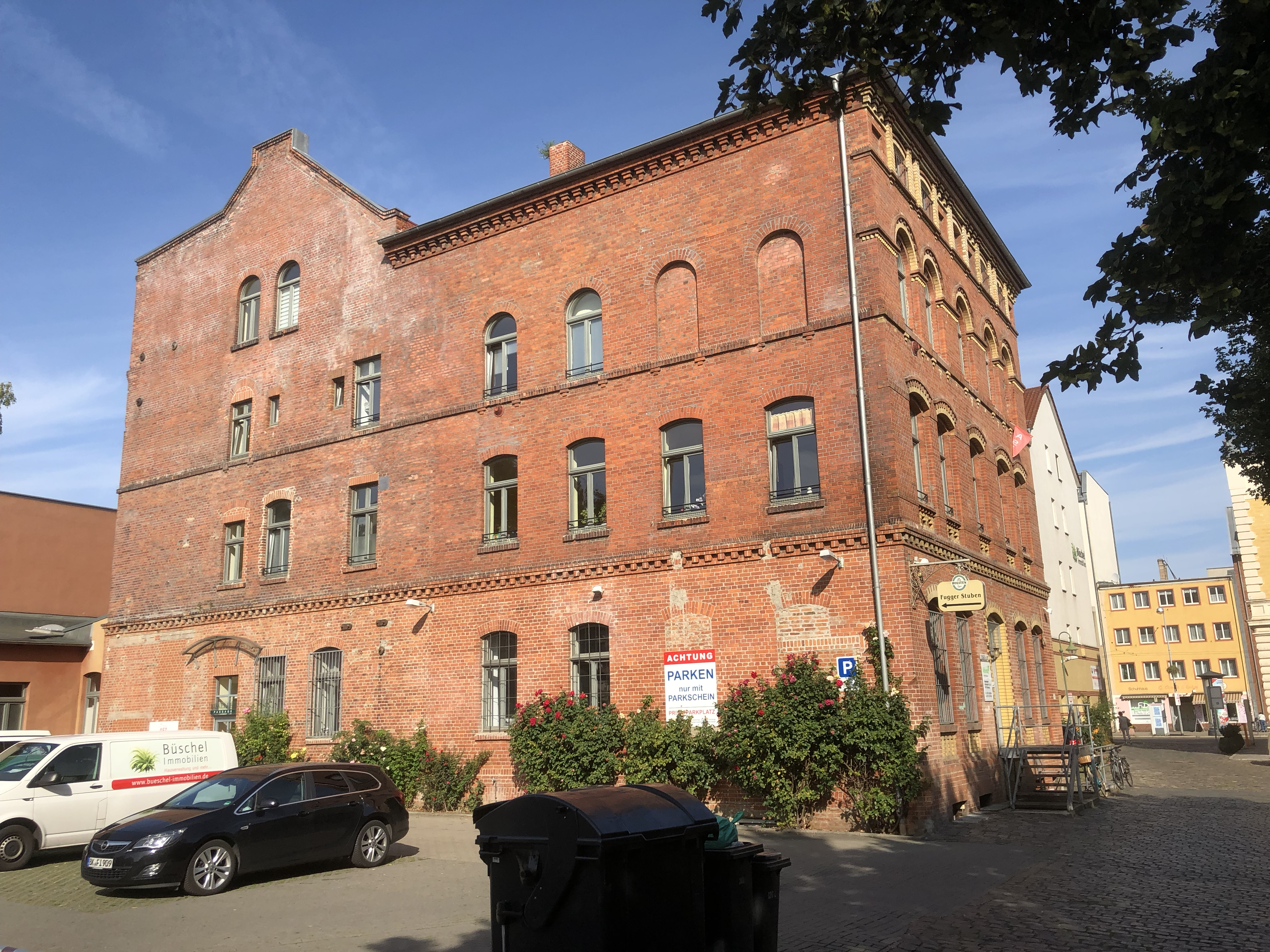 Halberstädter Straße 115s in Sudenburg